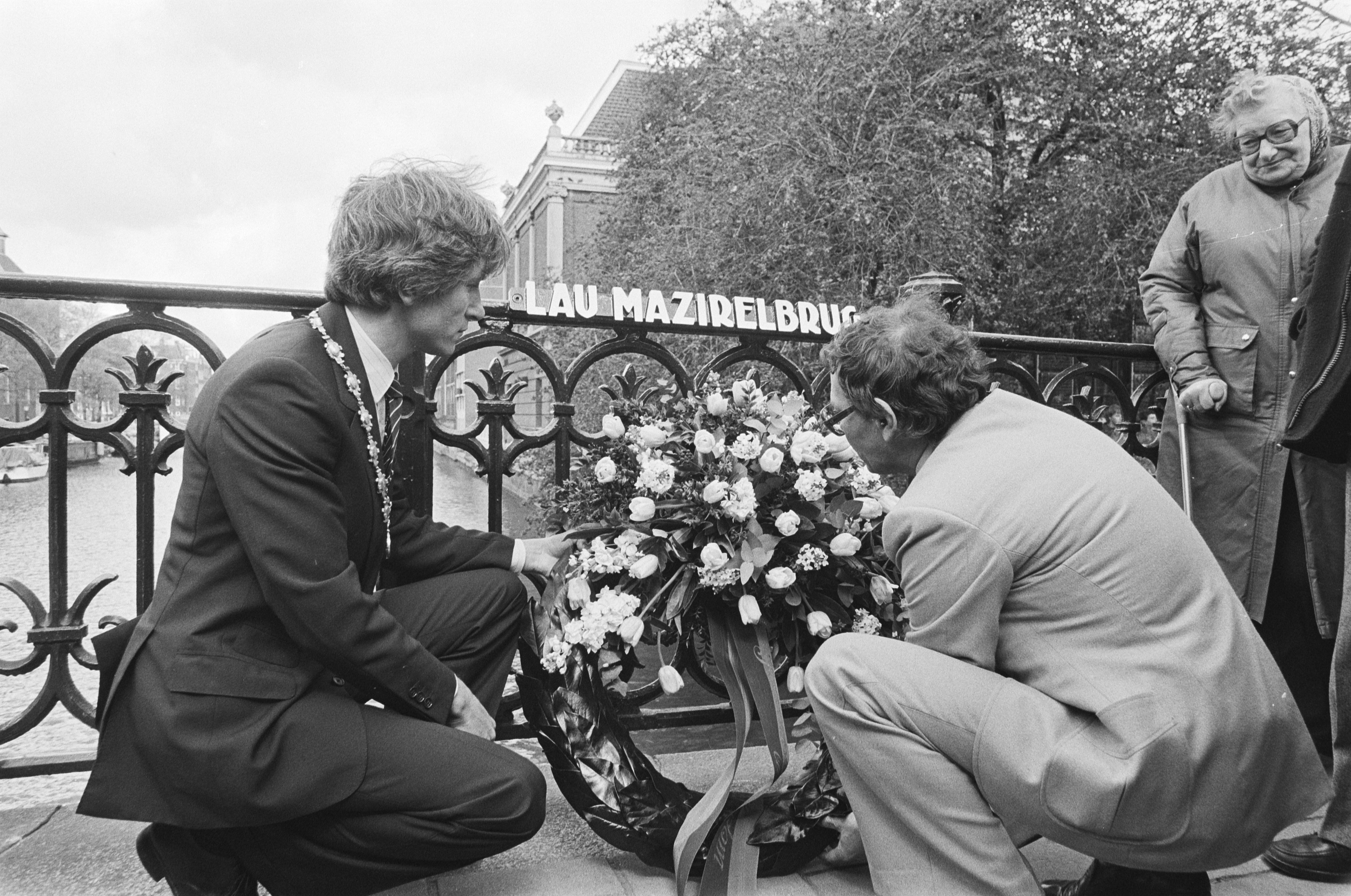 Collectie / Archief : Fotocollectie Anefo Reportage / Serie : [ onbekend ] Beschrijving : Brug over Muidergracht in de Roetersstraat vernoemd naar overleden verzetsstrijdster Lau (Laura Carola) Mazirel: wethouder Gert Jan Wolffensperger (l) en Jan Rogier leggen een krans Datum : 4 mei 1982 Locatie : Amsterdam, Noord-Holland Trefwoorden : bruggen, kransleggingen, verzetsstrijders, wethouders Persoonsnaam : Rogier, Jan, Wolffensperger, Gerrit Jan Fotograaf : Antonisse, Marcel / Anefo, [onbekend] Auteursrechthebbende : Nationaal Archief Materiaalsoort : Negatief (zwart/wit) Nummer archiefinventaris : bekijk toegang 2.24.01.05 Bestanddeelnummer : 932-1374